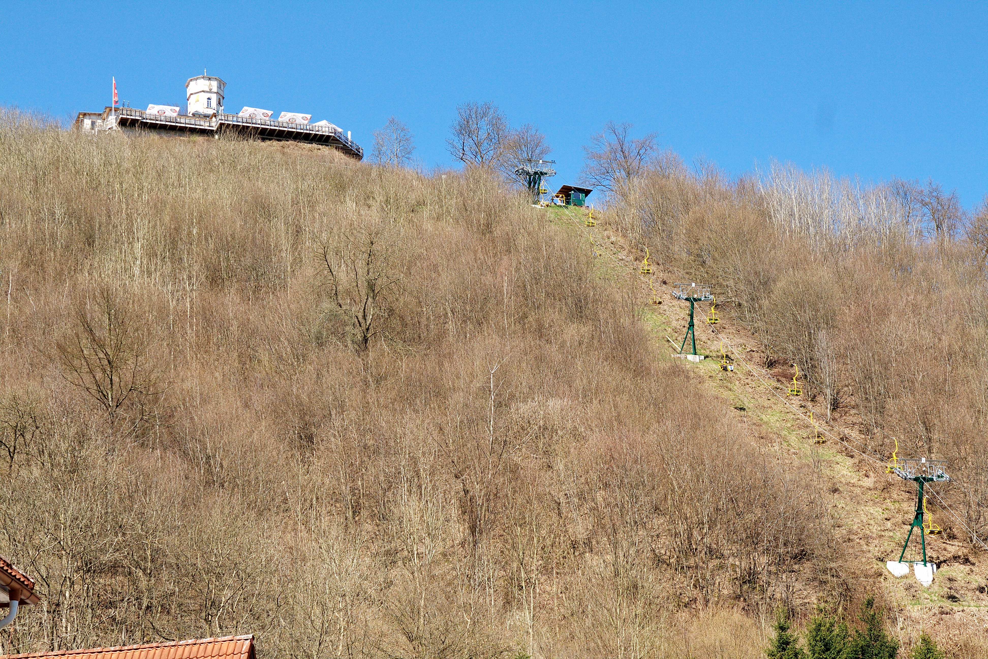 Bad Lauterberg (Harz) in Niedersachsen, Deutschland